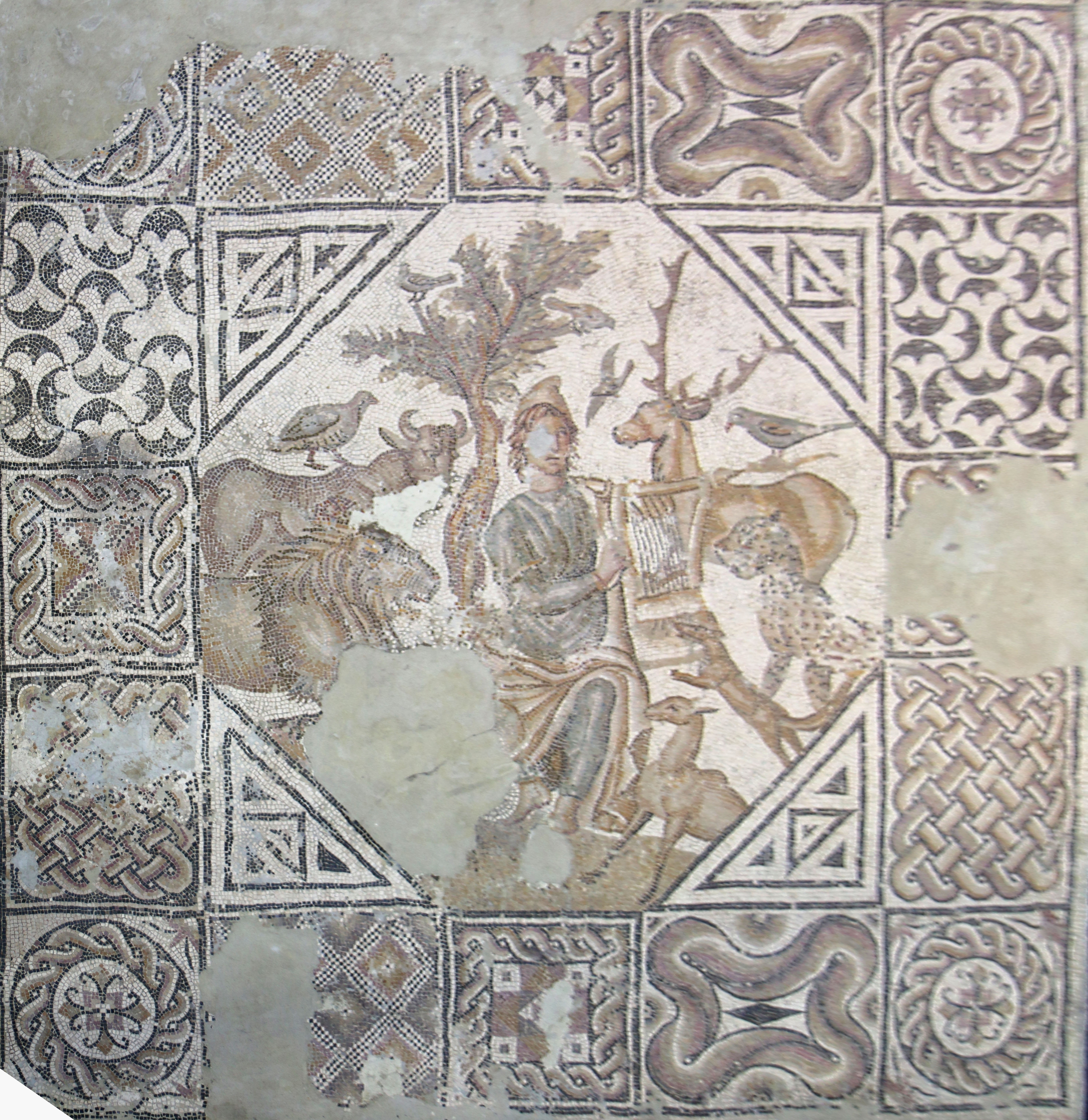 Mosaïque d'Orphée au musée d'Arles antique